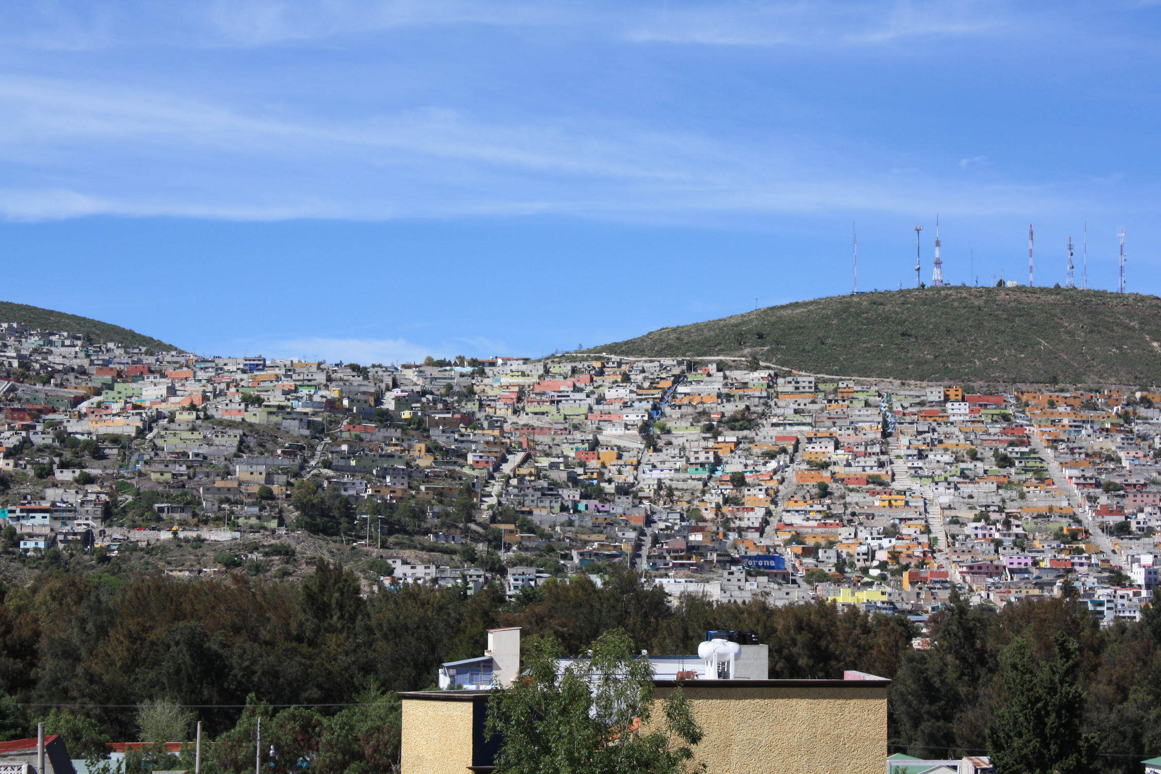 Panorámica de Pachuca. Montañas